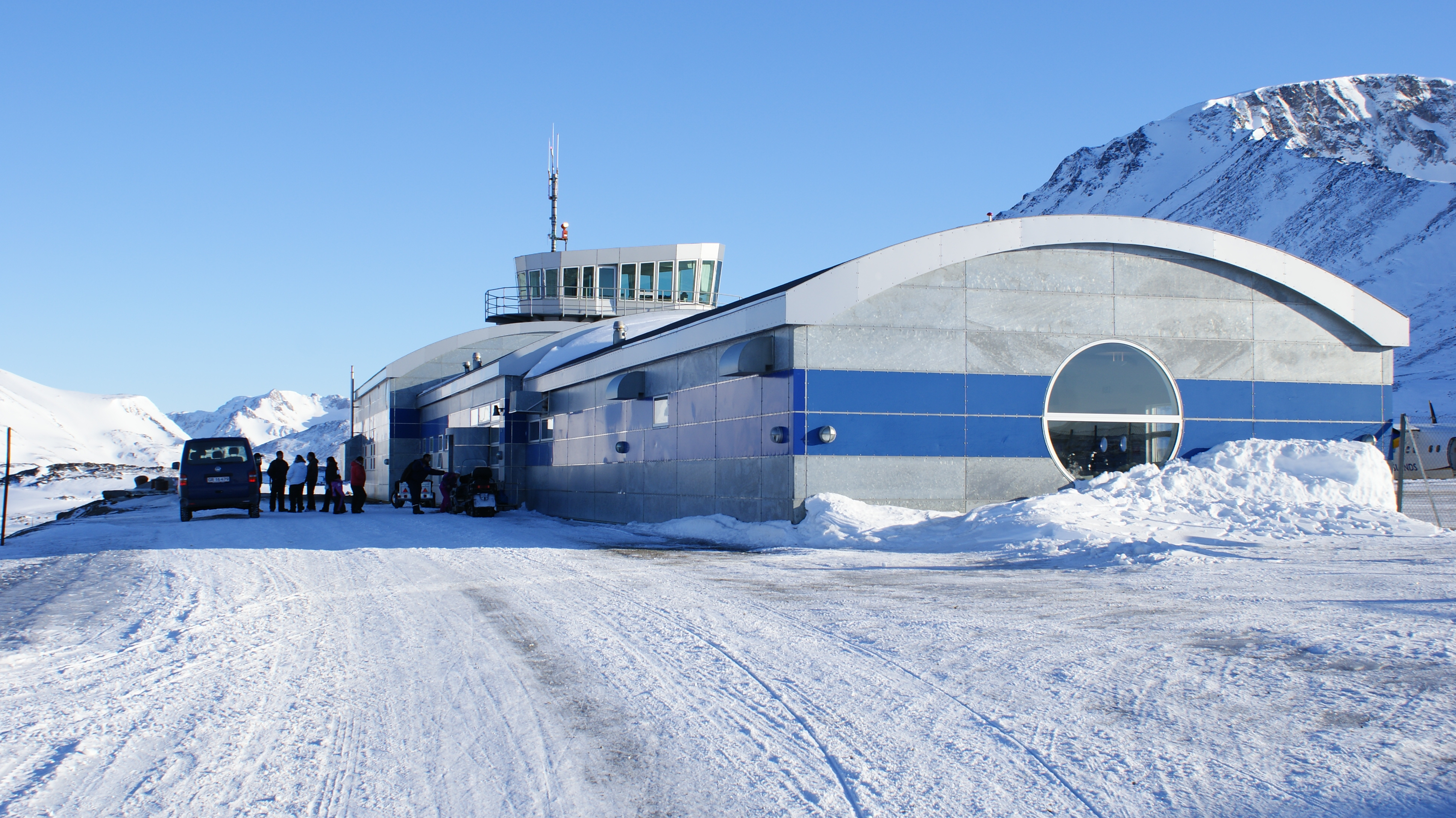 Kulusuk Airport, Greenland − terminal